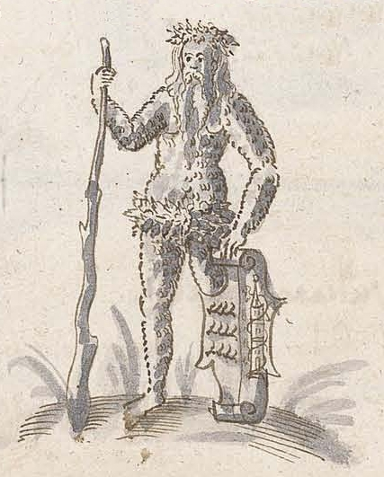 Wilder Mann als Schildträger des Marbacher Stadtwappens, Zeichnung von Simon Studion, 1597. Simon Studion: Vera origo illustrissimae et antiquissimae domus Wirtenbergicae. [Marbach am Neckar] 1597, Seite 26v.